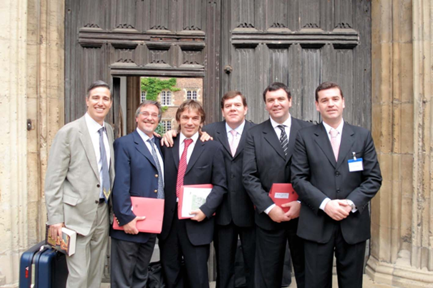 Durante el Simposio sobre crimen económico, en Jesus College, Cambridge, Inglaterra, donde Gabriel Cavallo asistió como expositor. De izquierda a derecha: Marcelo Figueiras, Gabriel Cavallo, Marcelo Ruiz, Guillermo Montenegro, Ariel Lijo y Alfredo Lijo.